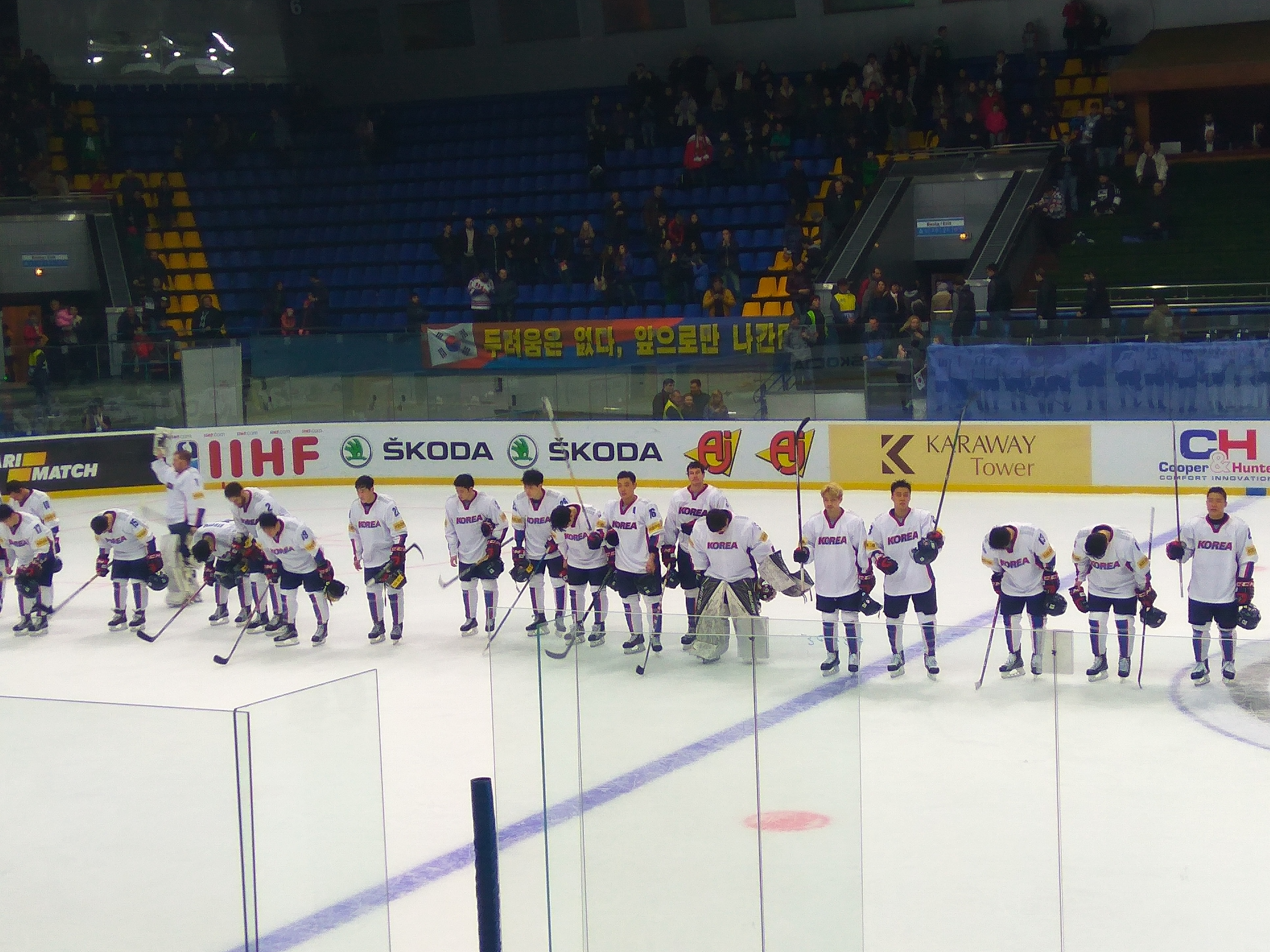 Чемпіонат світу з хокею 2017 у першому дивізіоні. Республіка Корея - Польща